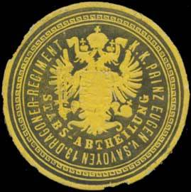 Sealing stamp Title: K.K. Prinz Eugen von Savoyen 13. Dragoner Regiment Stabs-Abtheilung Description: Place: size: 4 cm